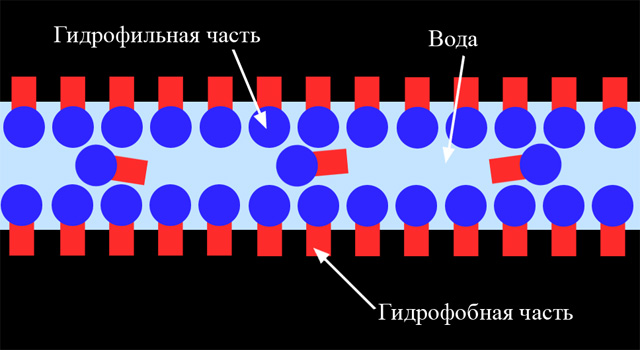 Схематичное изображение пленки мыльного пузыря в крупном масштабе